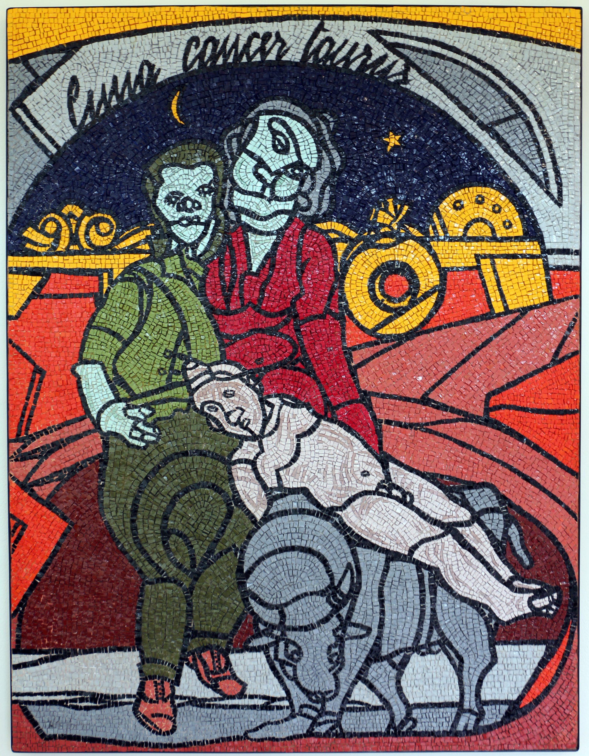 Collezione Mosaici Moderni - NB: Museum explicitly authorized the upload of its contemporary art collection for WLM 2016 (for further info ask WLM Italy organizators). This is a photo of a monument which is part of cultural heritage of Italy.